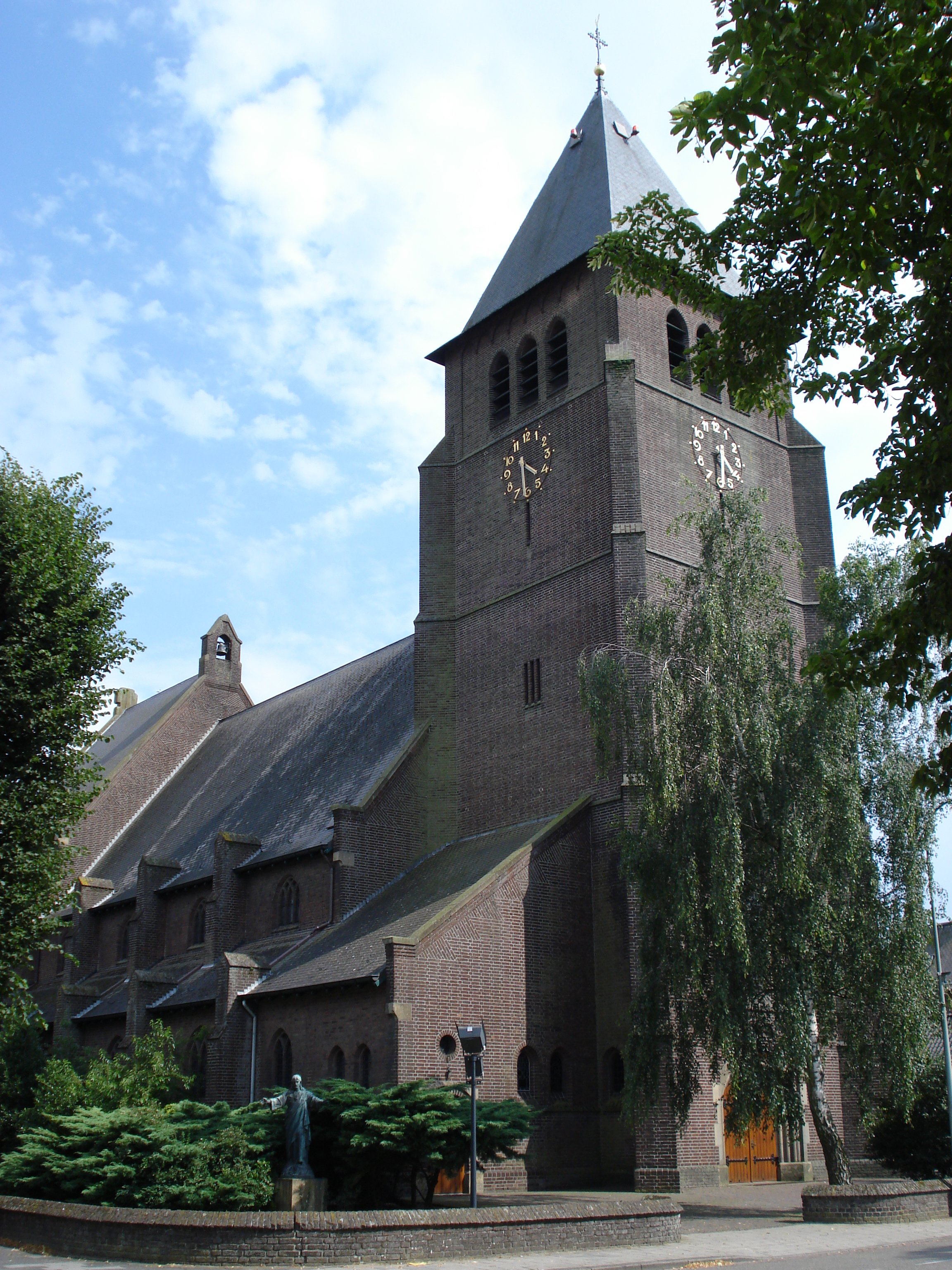 Volkel, commune d'Uden, North Brabant, l'église (tour)